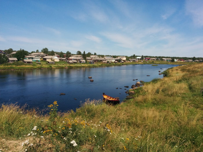 Ню́хча — село в Беломорском районе Республики Карелия